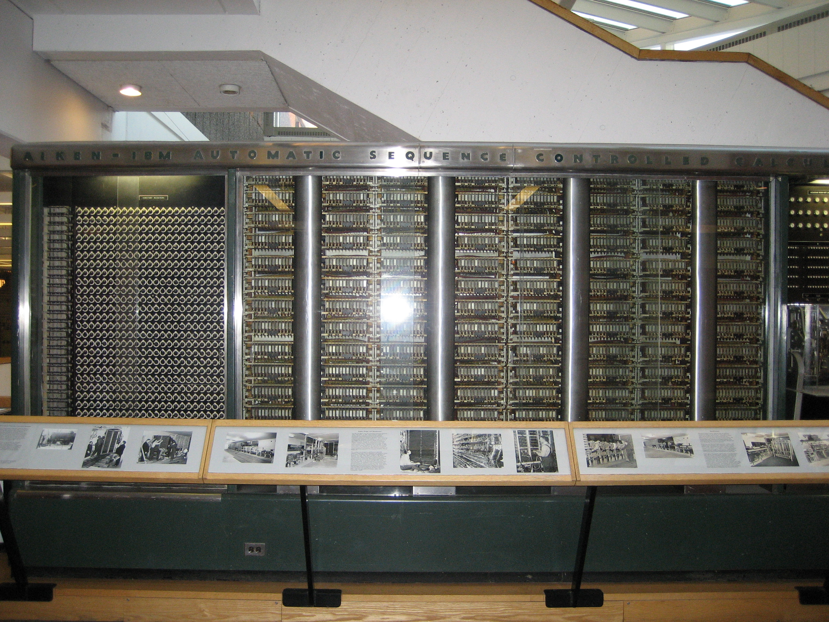 Em 1944 na Universidade de Harvard – EUA, o engenheiro Howard Aiken foi um pioneiro da computação, sendo o principal responsável pelo desenvolvimento do computador conhecido como Harvard Mark I, patrocinado pela IBM.